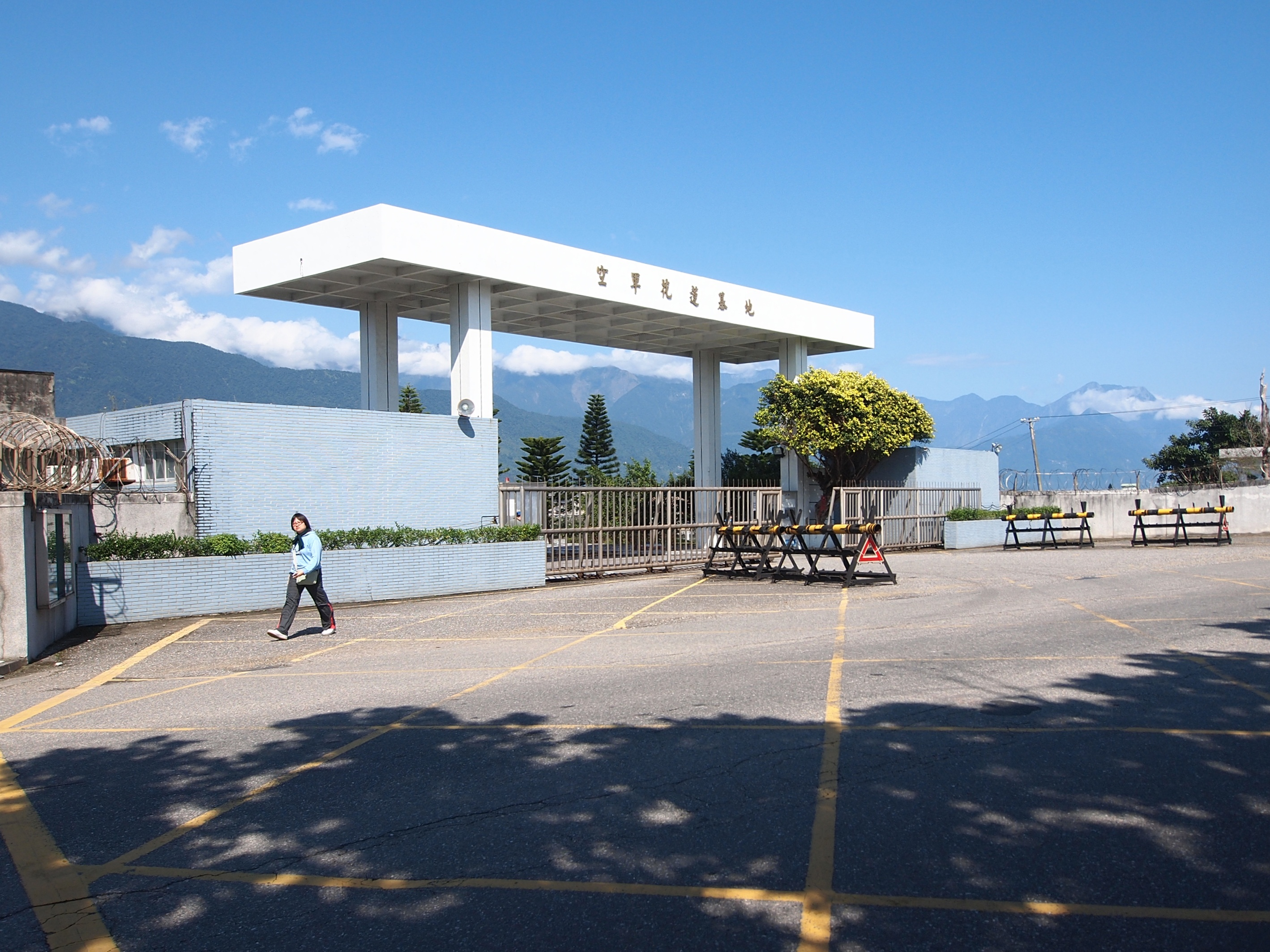 中華民國空軍花蓮基地大門。